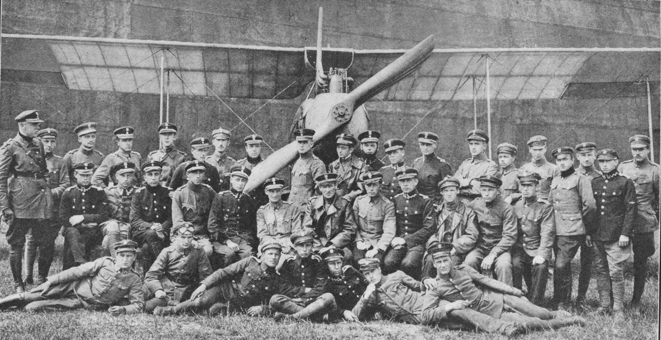 Personel Krakowskiej Szkoły Pilotów maj 1919.